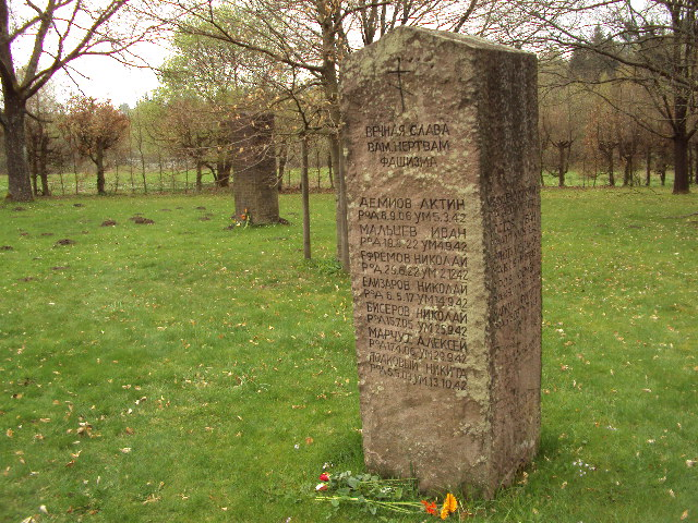 Gedenksteine auf dem "Russenfriedhof" östlich von Clausthal zum Gedenken an die verstorbenen russischen und ukrainischen Zwangsarbeiter des Werk Tanne